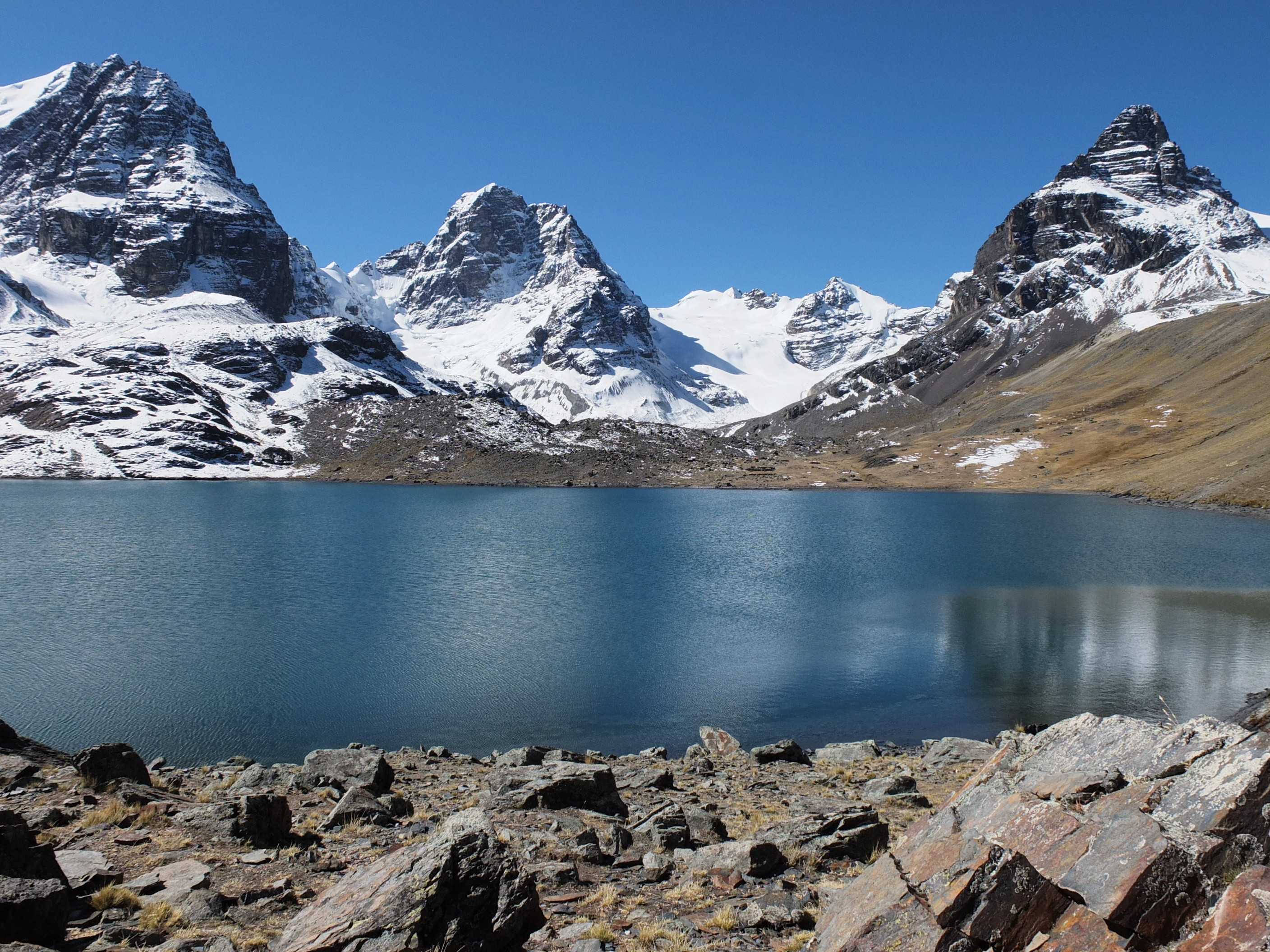 Laguna Chiar Khota, Cordillera Real, Bolivien 2013